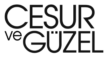 Logo de la serie de televisión Cesur ve Güzel